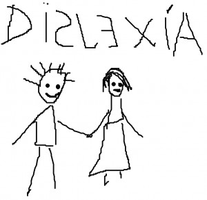 la dislexia